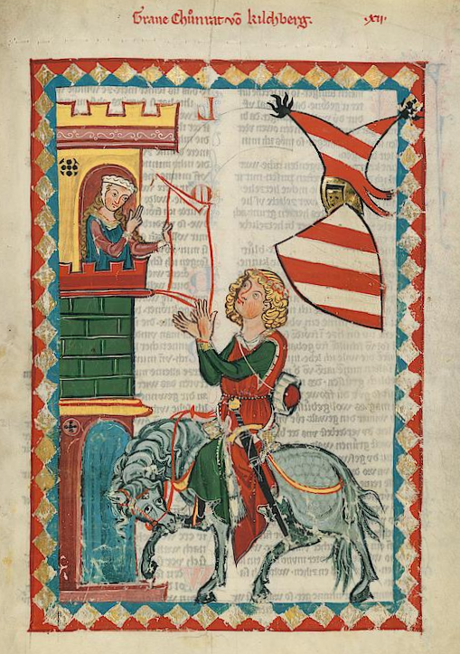 Codex Manesse, UB Heidelberg, Cod. Pal. germ. 848, fol. 24r: Herr Konrad Kirchberg.